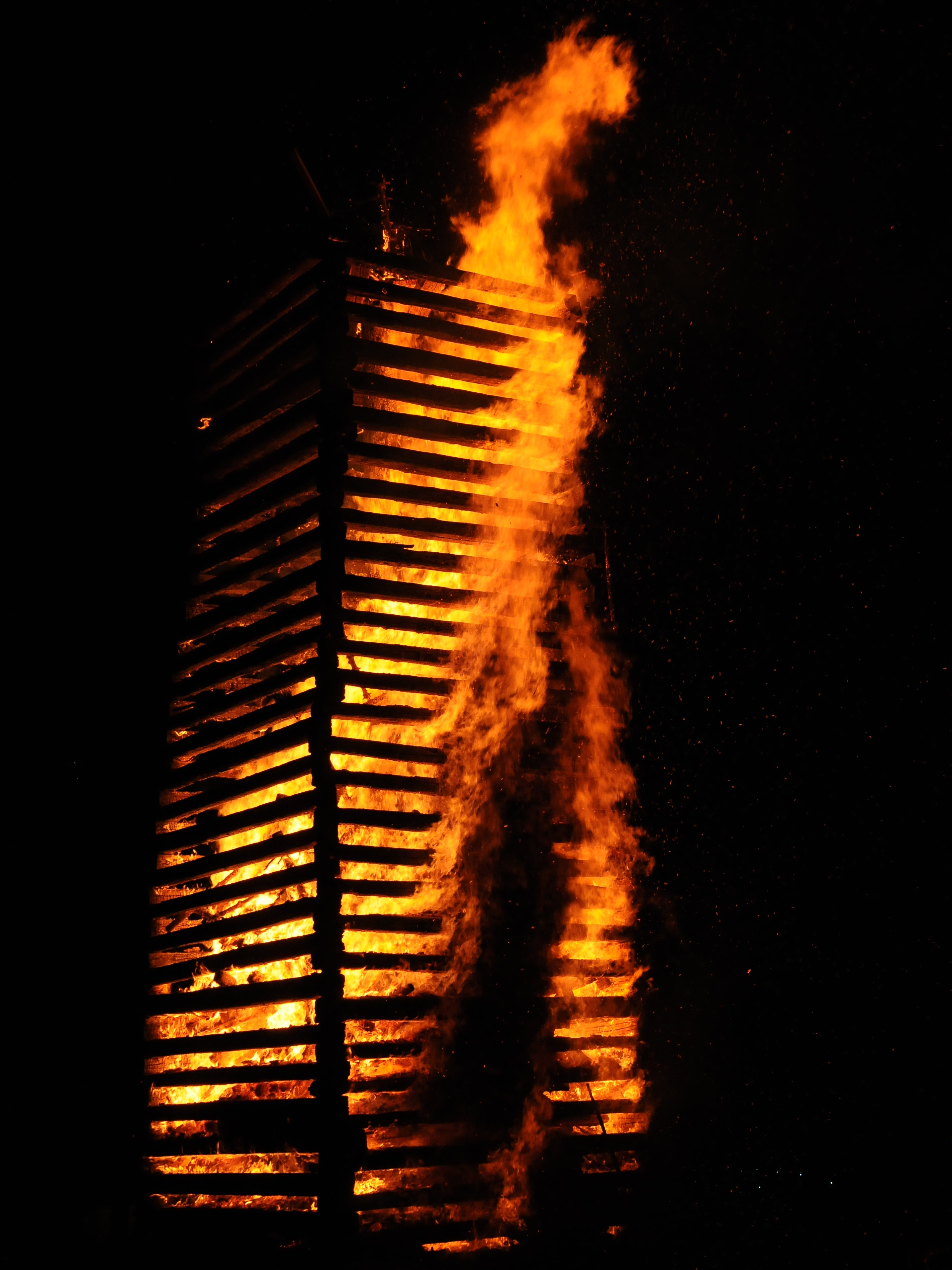 das traditionelle Funkenfeuer an der Bödelestraße, Höhe Sandkurve in Dornbirn.